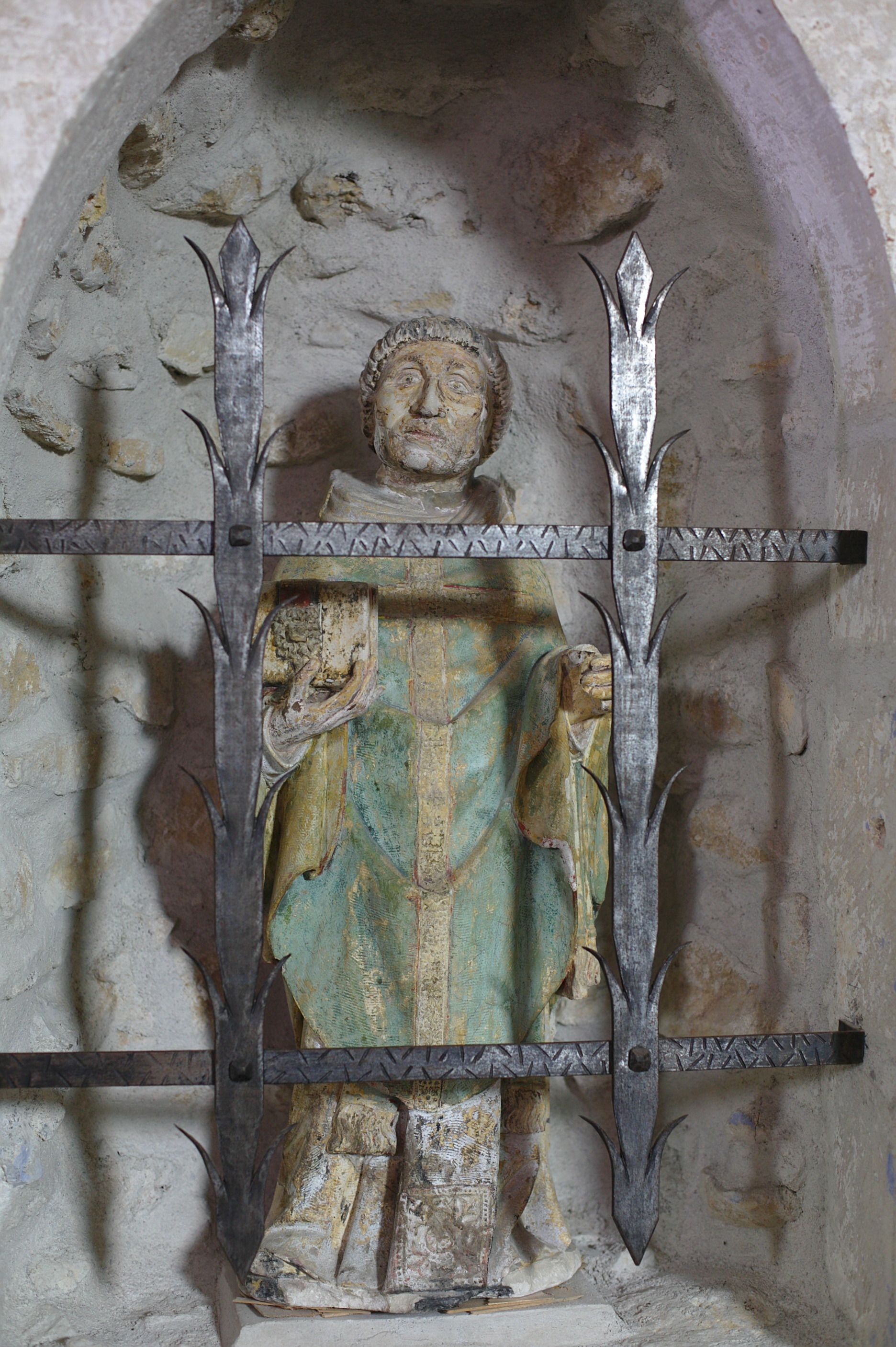 Église Saint-Romain de Mazerolles : statue de Saint Sylvain.